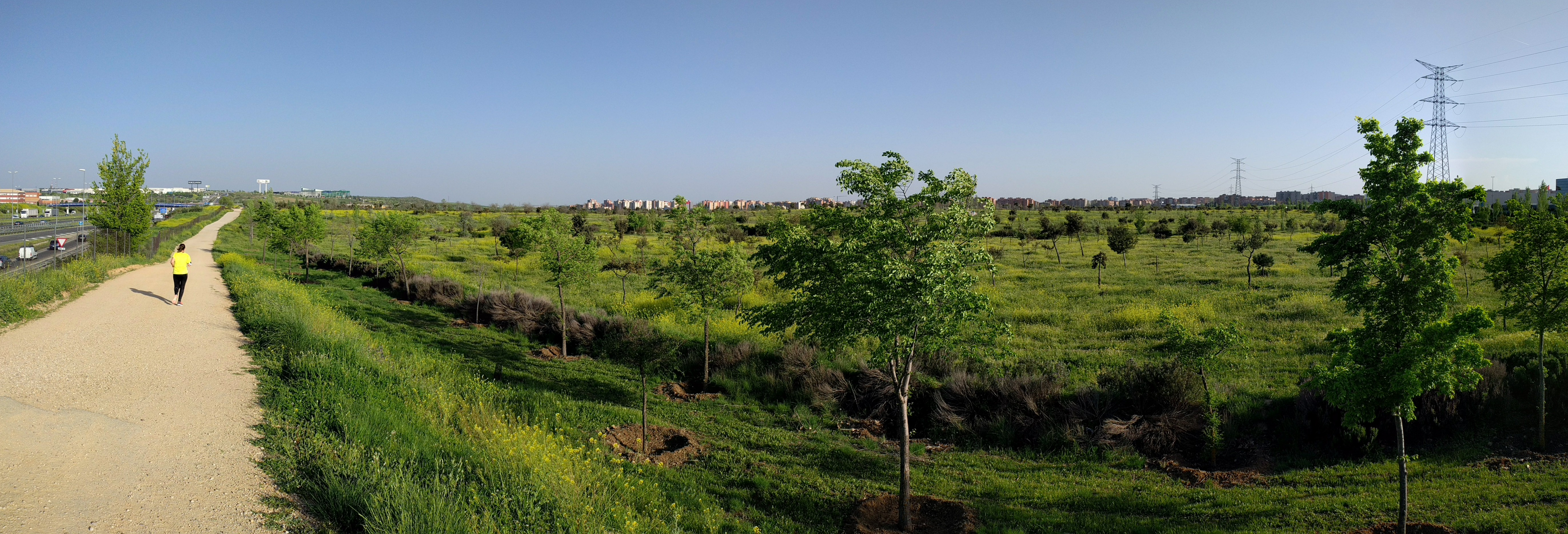 Panorámica de Bosque Sur (Fuenlabrada, Madrid, España) desde la M-50